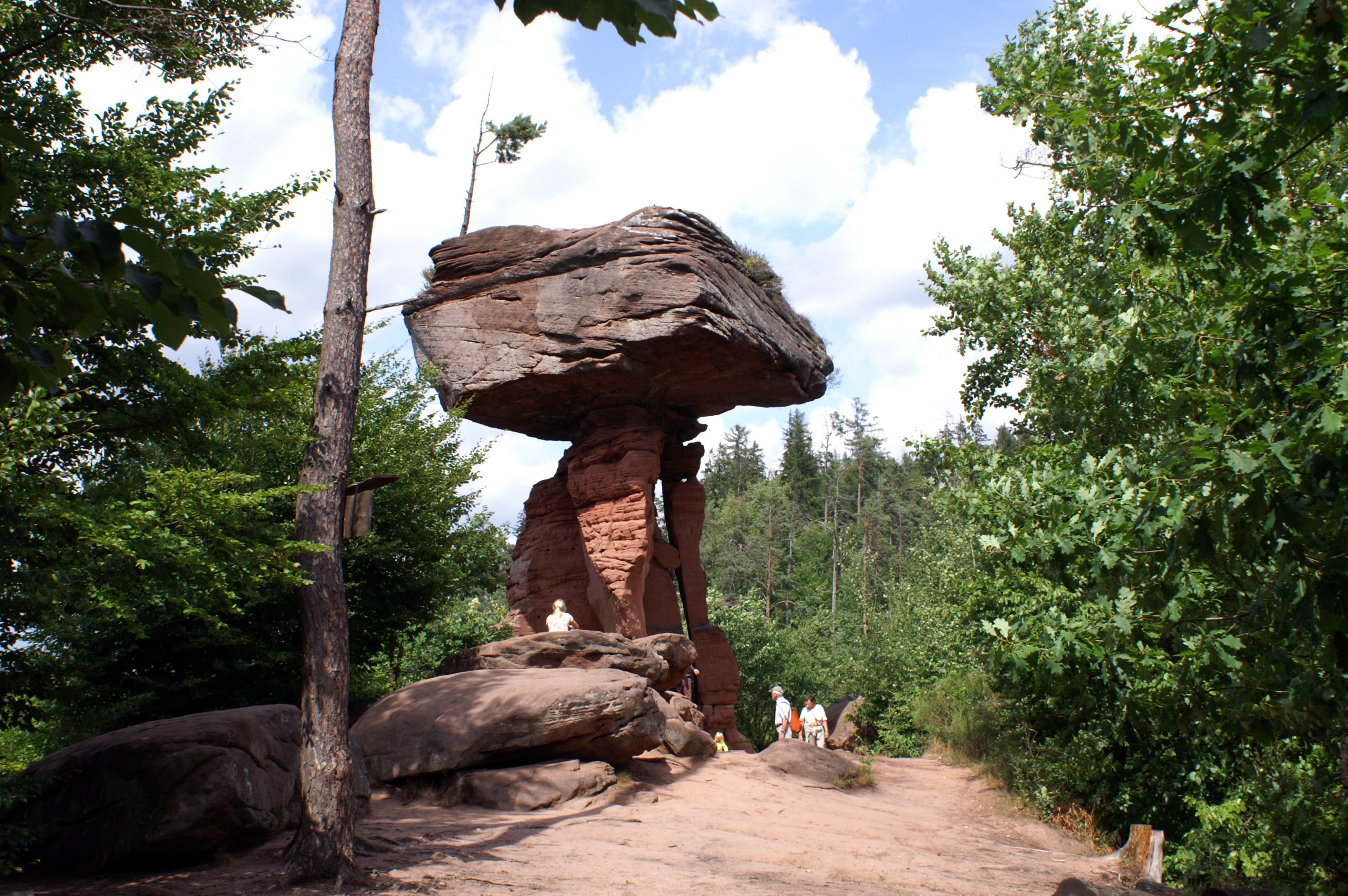 Der Teufelstisch in Hinterweidenthal im Wasgau, Rheinland-Pfalz, Deutschland.